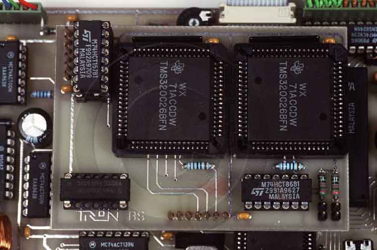 Bild des DSP-Boards des Cryptophon.